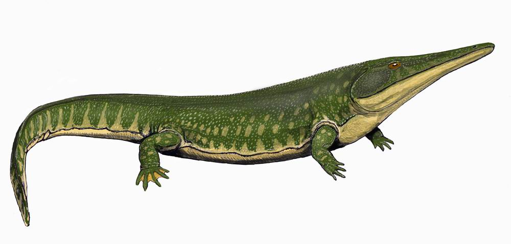 Архегозавр (Archegosaurus decheni) - ранняя пермь Богемии